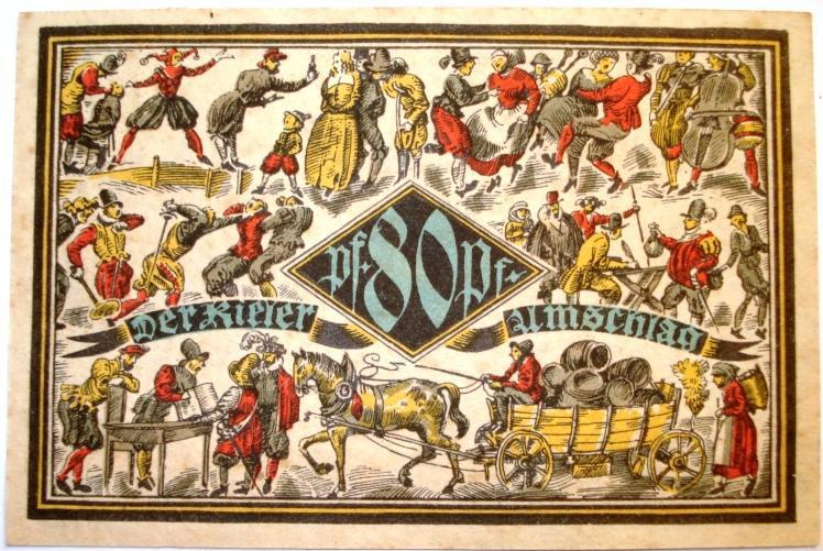 Kiel - Notgeld - Kieler-Umschlag